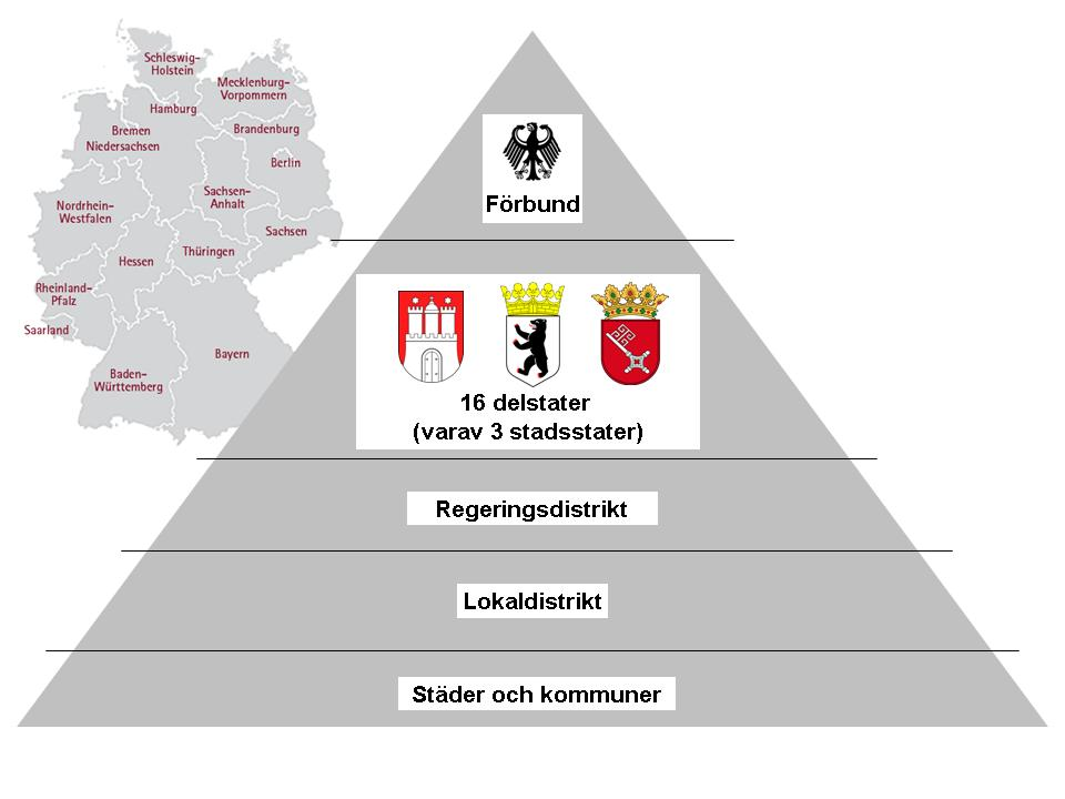 översikt tysk förvaltning